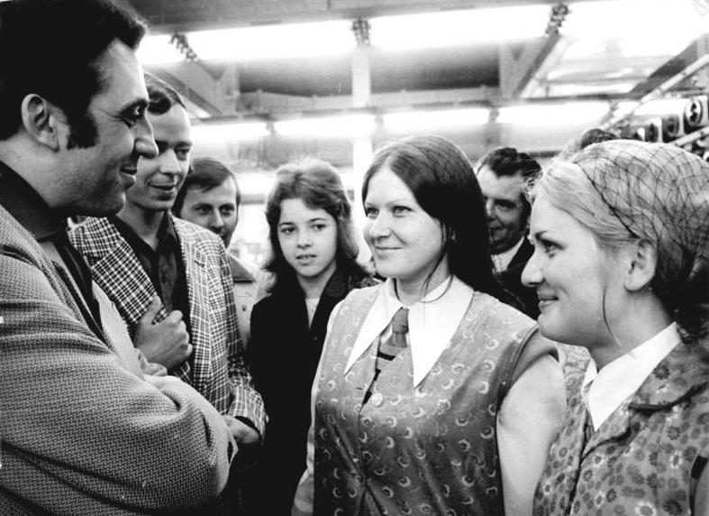 Gera, Egon Krenz, polnische Gastarbeiterin ADN-ZB Liebers 10.6.74-Bez. Gera: Bilanz über die Verwirklichung sozialistischer Jugendpolitik zogen am 10.6.74 die Werktätigen von 15 Großbetrieben des Bezirkes Gera mit Jugendlichen. Wenige Stunden vor Eröffnung der diesjährigen "Woche der Jugend und Sportler" berieten Mädchen und Jungen gemeinsam mit Mitgliedern des Ministerrates, Sekretären des FDJ-Zentralrates und Vertretern anderer Massenorganisationen über ihre Aufgaben zur Stärkung der Republik. Im Chemiefaserkombinat Schwarza informierte sich Egon Krenz, Mitglied des ZK der SED und 1. Sekretär des FDJ-Zentralrates, über bisherige Ergebnisse in der "FDJ-Initiative DDR 25", wobei es zu einem herzlichen Gespräch mit Helena Zelinska (r.) und Czeslawa Draych aus der VR Polen, die zur Zeit im Chemiefaserkombinat als Streckzwirnerinnen arbeiten, kam.